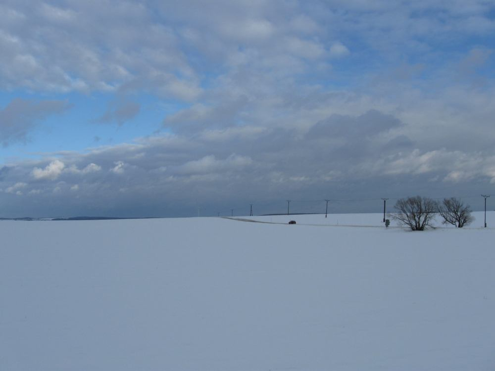 Drahanská vrchovina pod Kojálem v zimním období